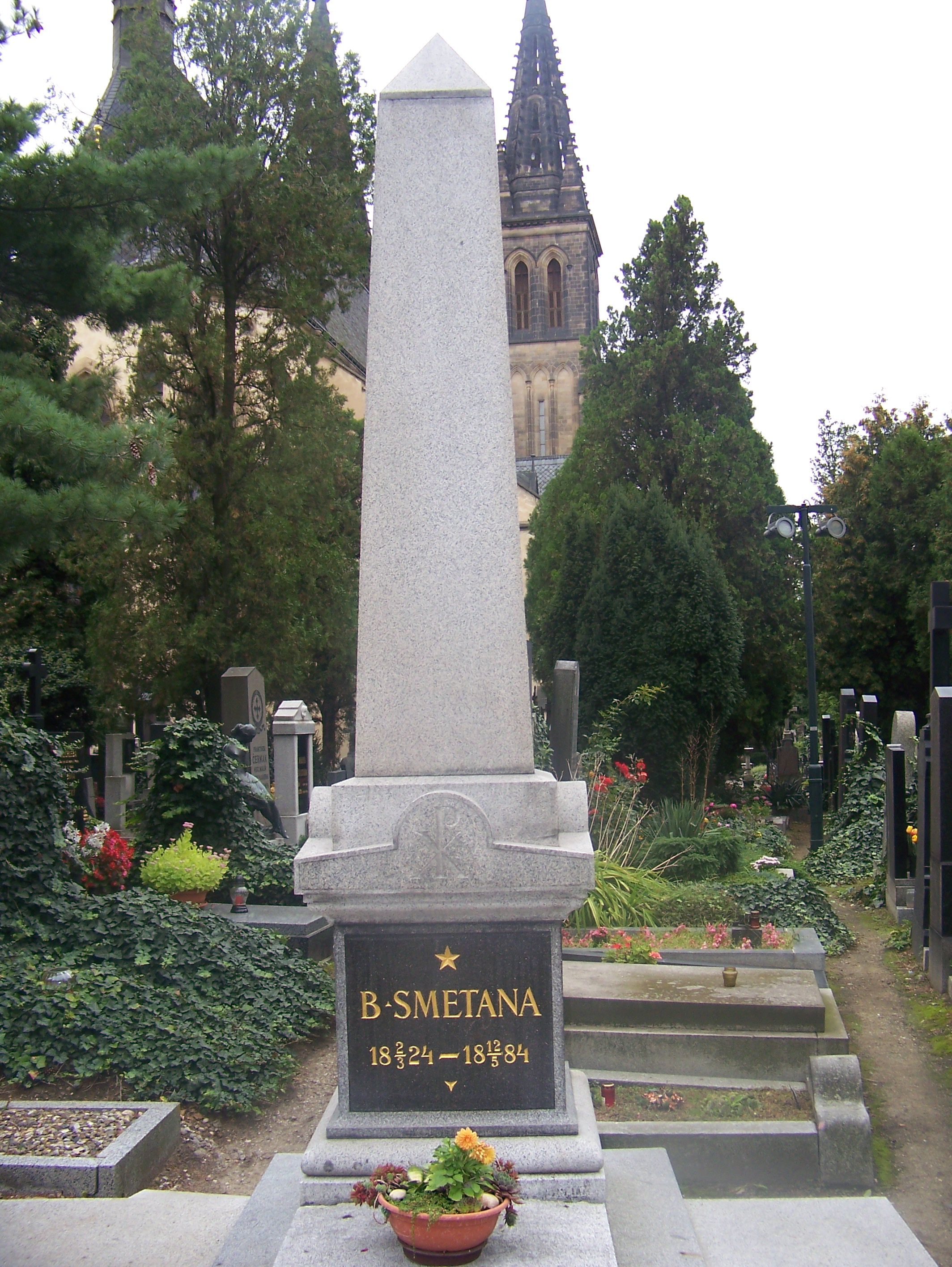 Grób Bedricha Smetany na Cmentarzu Wyszehradzkim